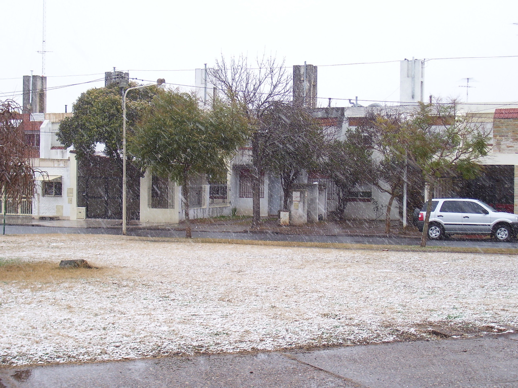 Nevada del 9 de julio de 2007 en Pergamino, Argentina. Plaza Della Paolera.